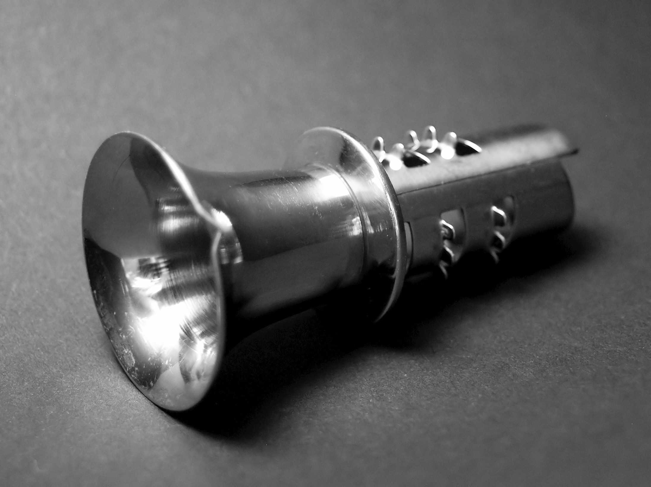 Zitronenpresse, zum hereinschrauben in die Frucht